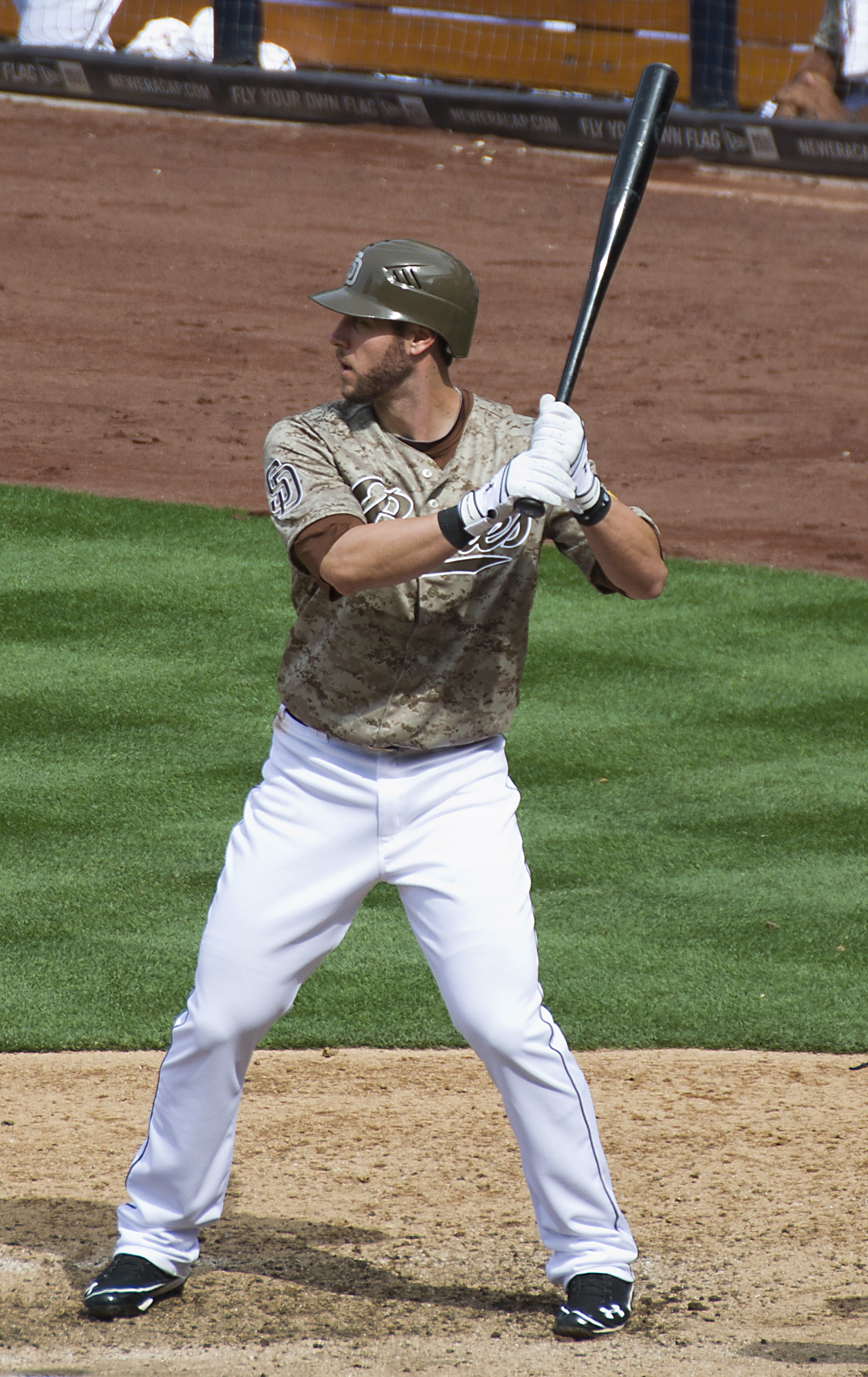 Jeremy Hermida